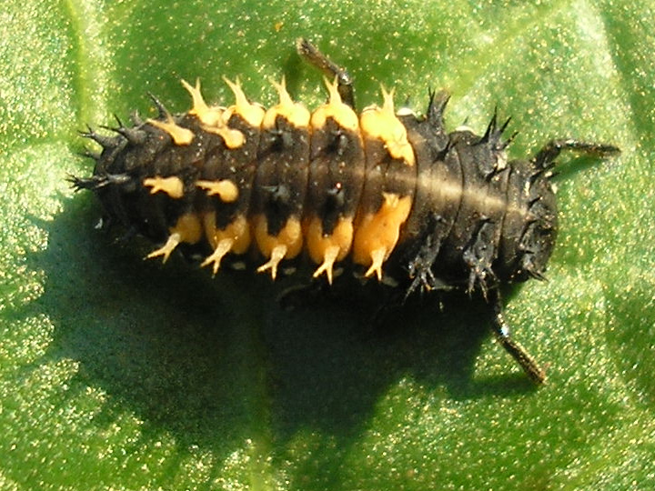 Harmonia axyridis larva Location: Hengelo (Overijssel), Netherlands --- nl: Larve van Veelkleurig Aziatisch lieveheersbeestje (Harmonia axyridis). Locatie: Hengelo (Overijssel)